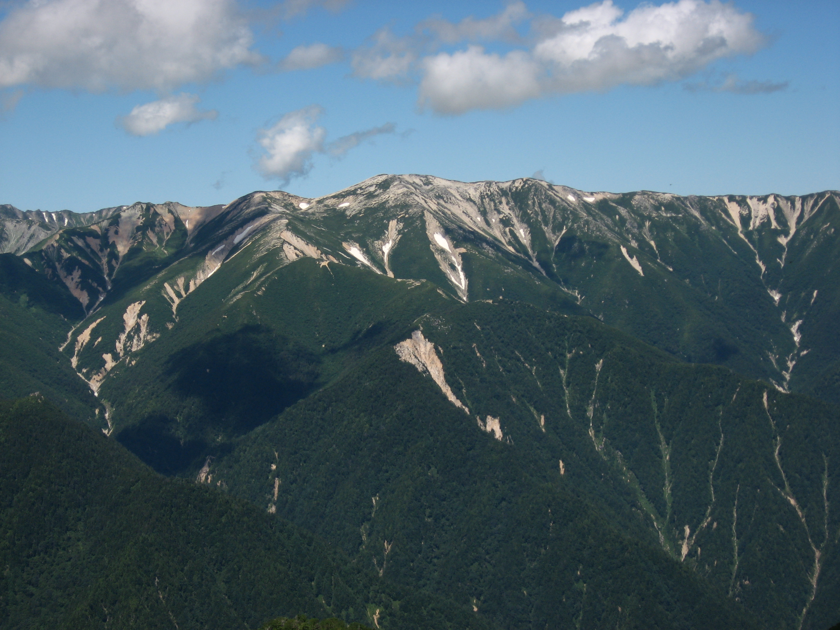 燕山荘横より望む野口五郎岳